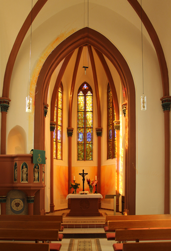 Blick ins Innere der evangelischen Kirche in Merzig, Landkreis Merzig-Wadern, Saarland. Die Kirche wurde in den Jahren 1863–65 nach Plänen von Carl Friedrich Müller (* 14. Juni 1833 in Hersfeld; † 1. August 1889 ebd.) errichtet.